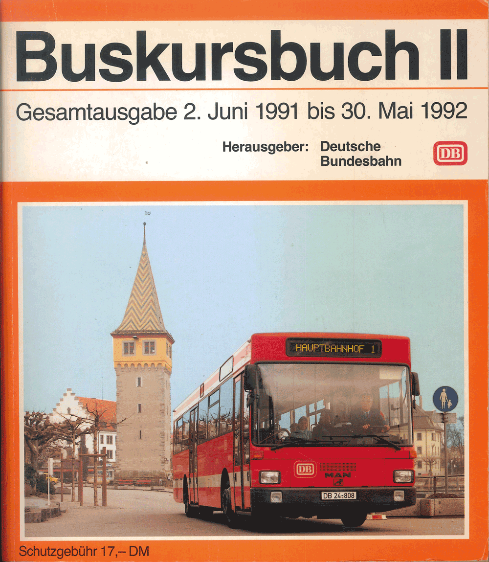 Titel des Bandes II der Gesamtausgabe des Buskursbuches der Deutschen Bundesbahn für das Fahrplanjahr 1991/1992